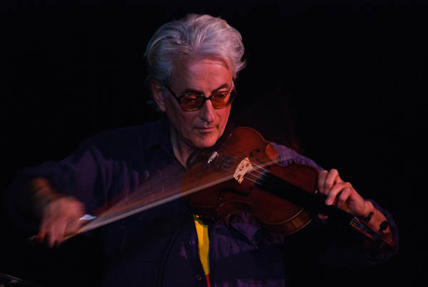 Jon Rose at Steim, Amsterdam